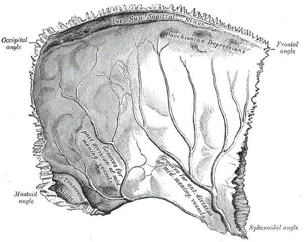 Left parietal bone. Inner surface.